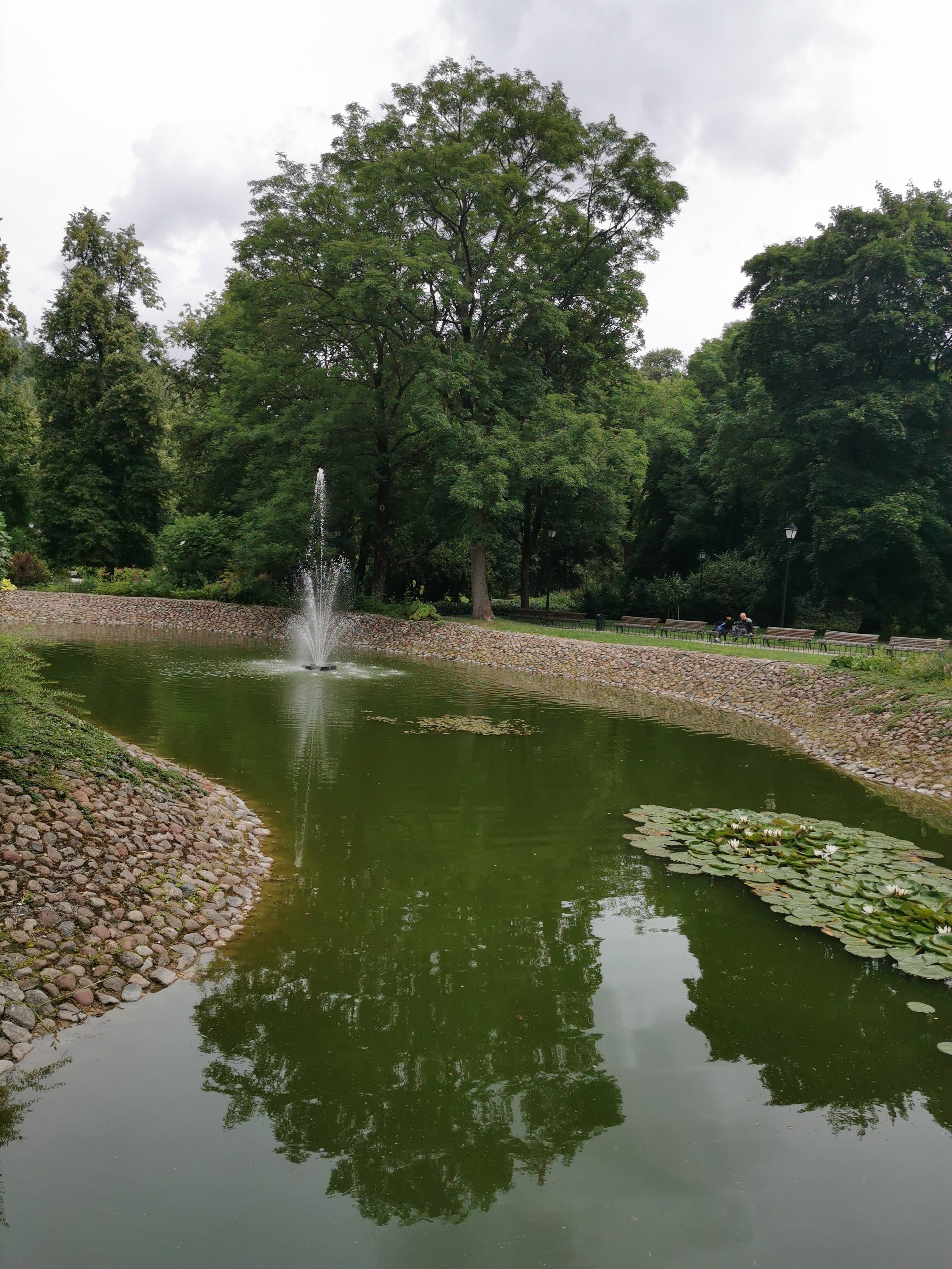 Bernardinų sodas